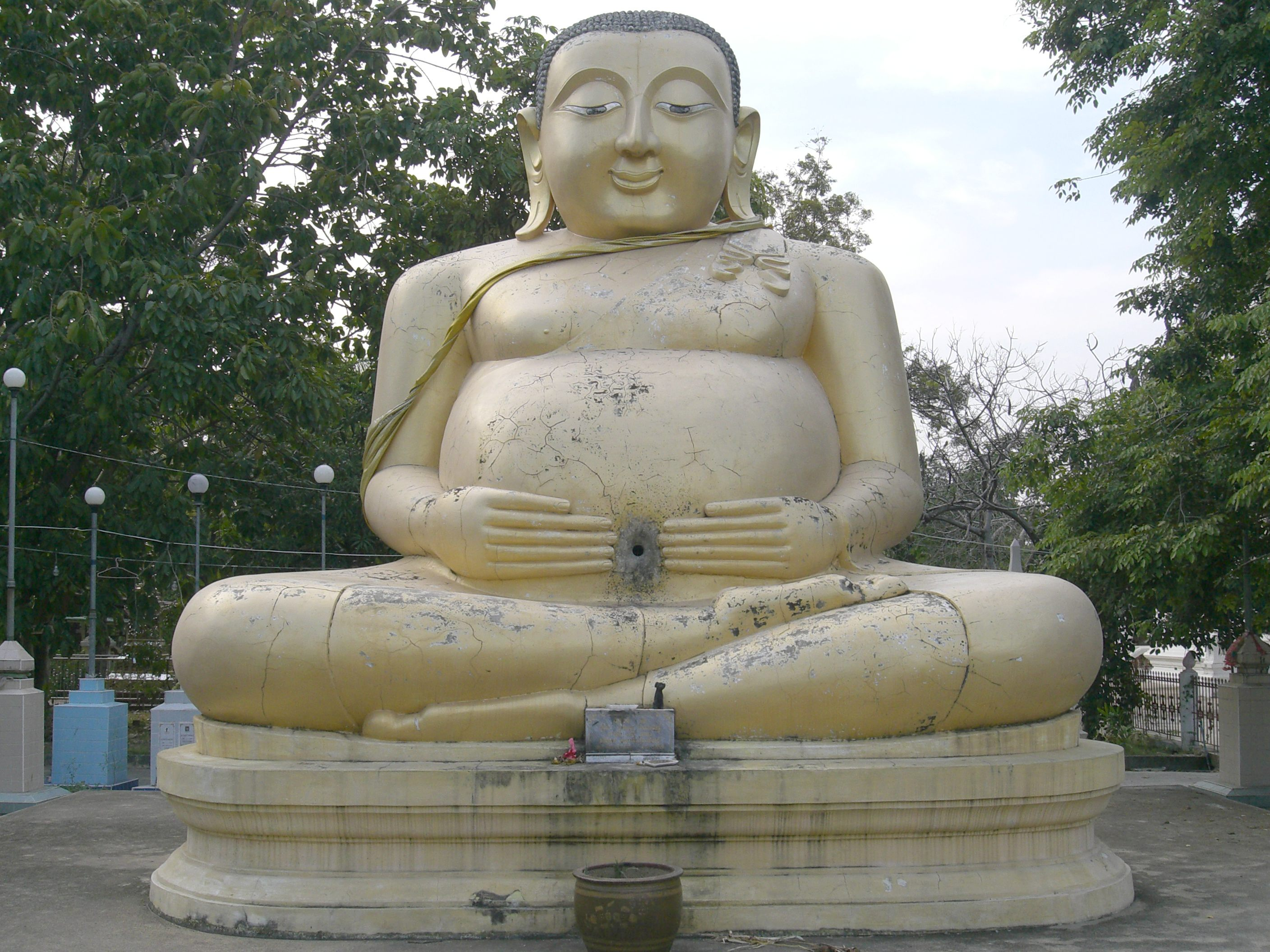 Wat Bang Nam Phueng Nok in Phra Pradaeng, Thailand